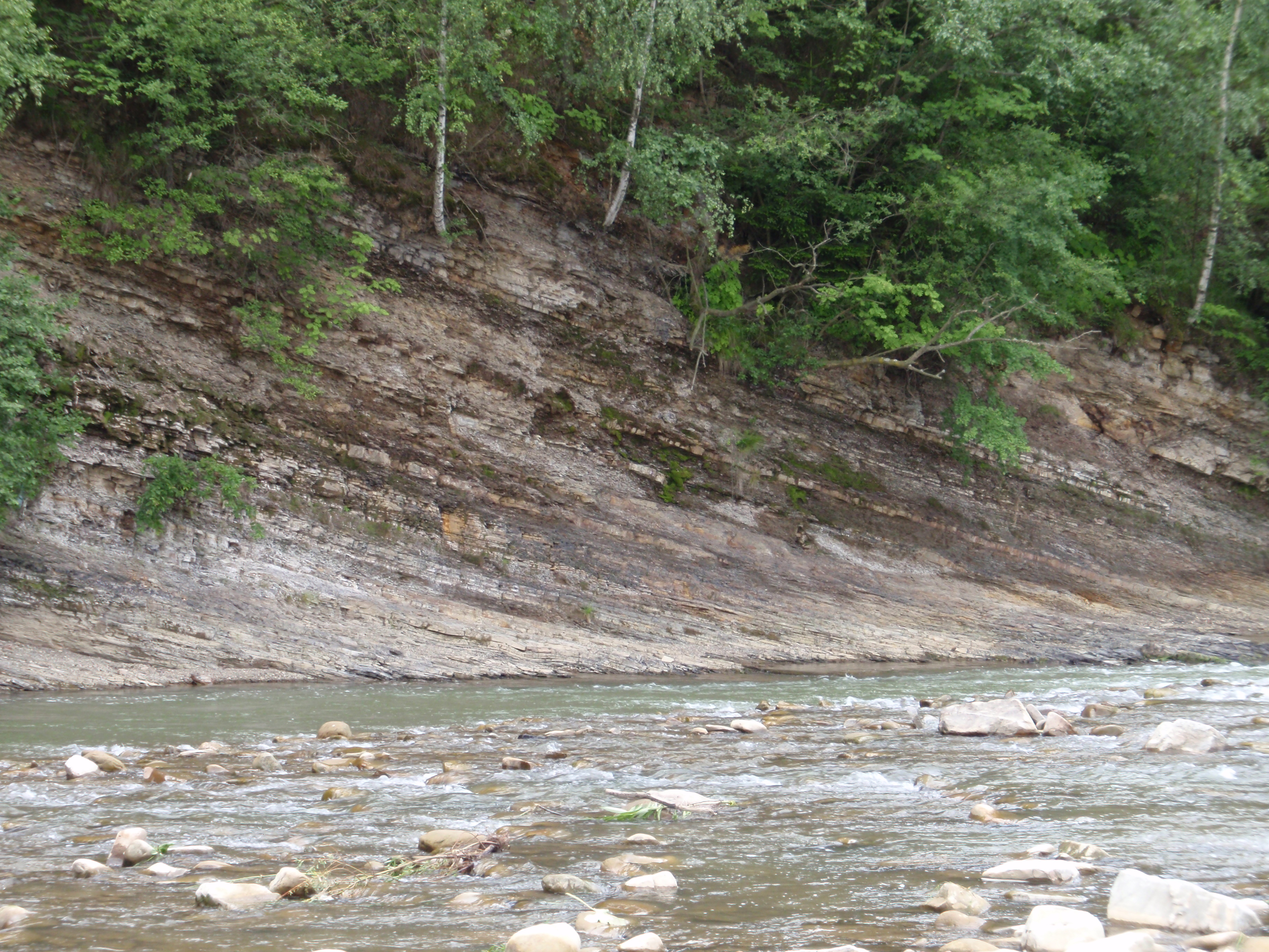 Відслонення порід менілітової світи в правому березі ріки Опір, біля Сколе, Скибова зона Українських Карпат